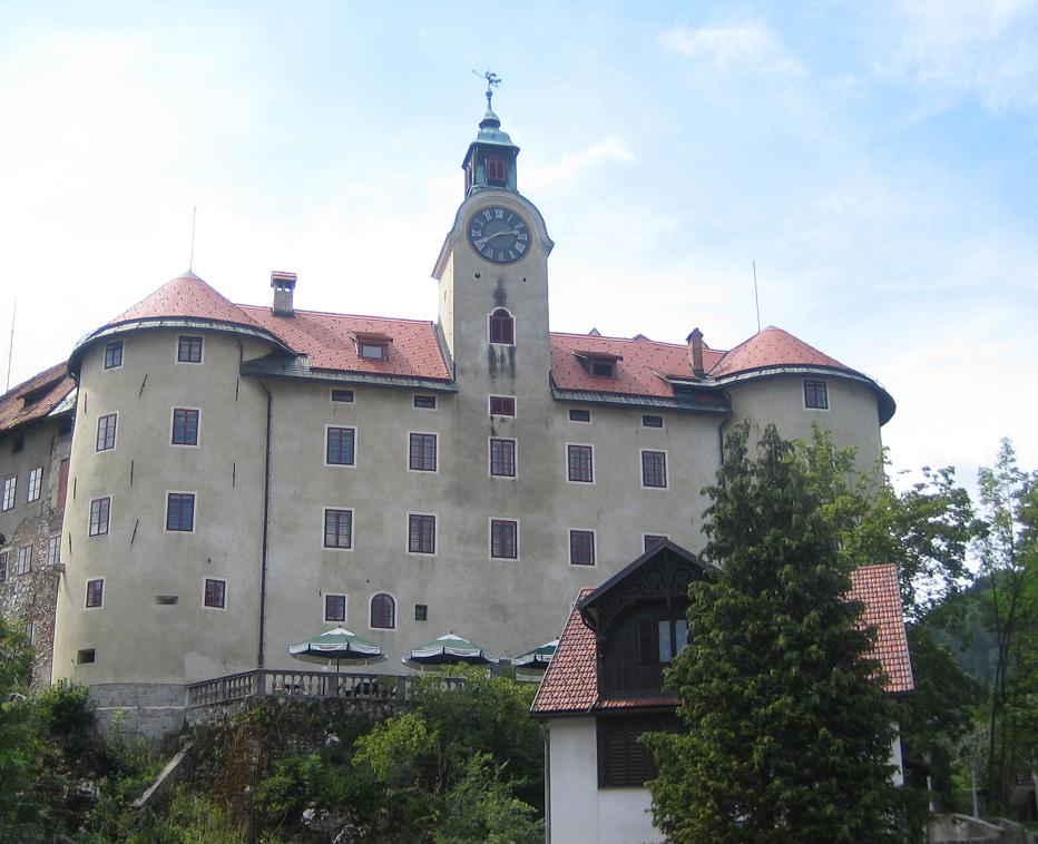 Gerwerkenegg castle in Idrija, Slovenia photo:Ziga 06:58, 12 August 2006 (UTC)